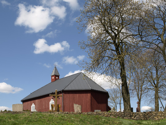 Šniūraičiai, šv. Antano Paduviečio bažnyčia